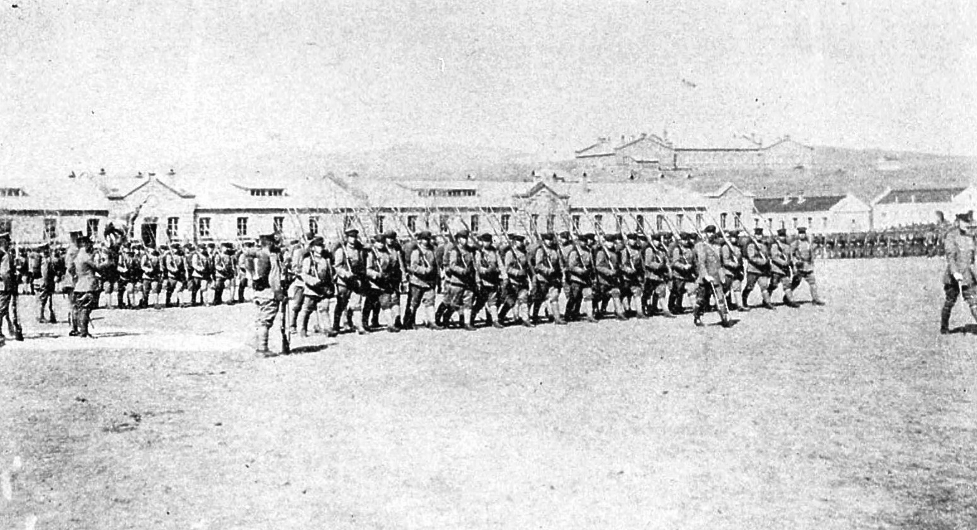 旅順における歩兵第三十九連隊